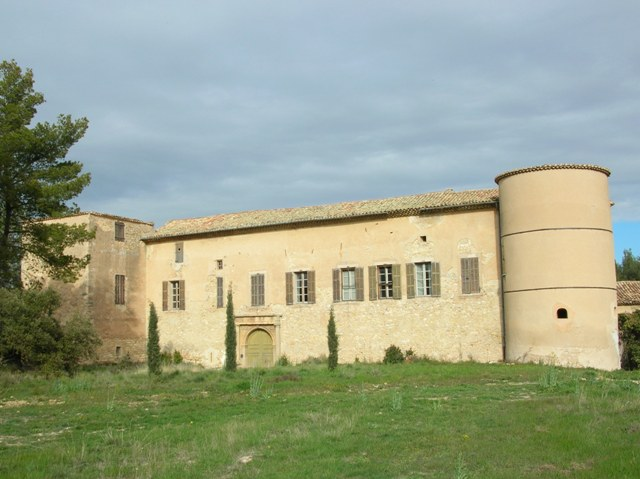 château SMJ